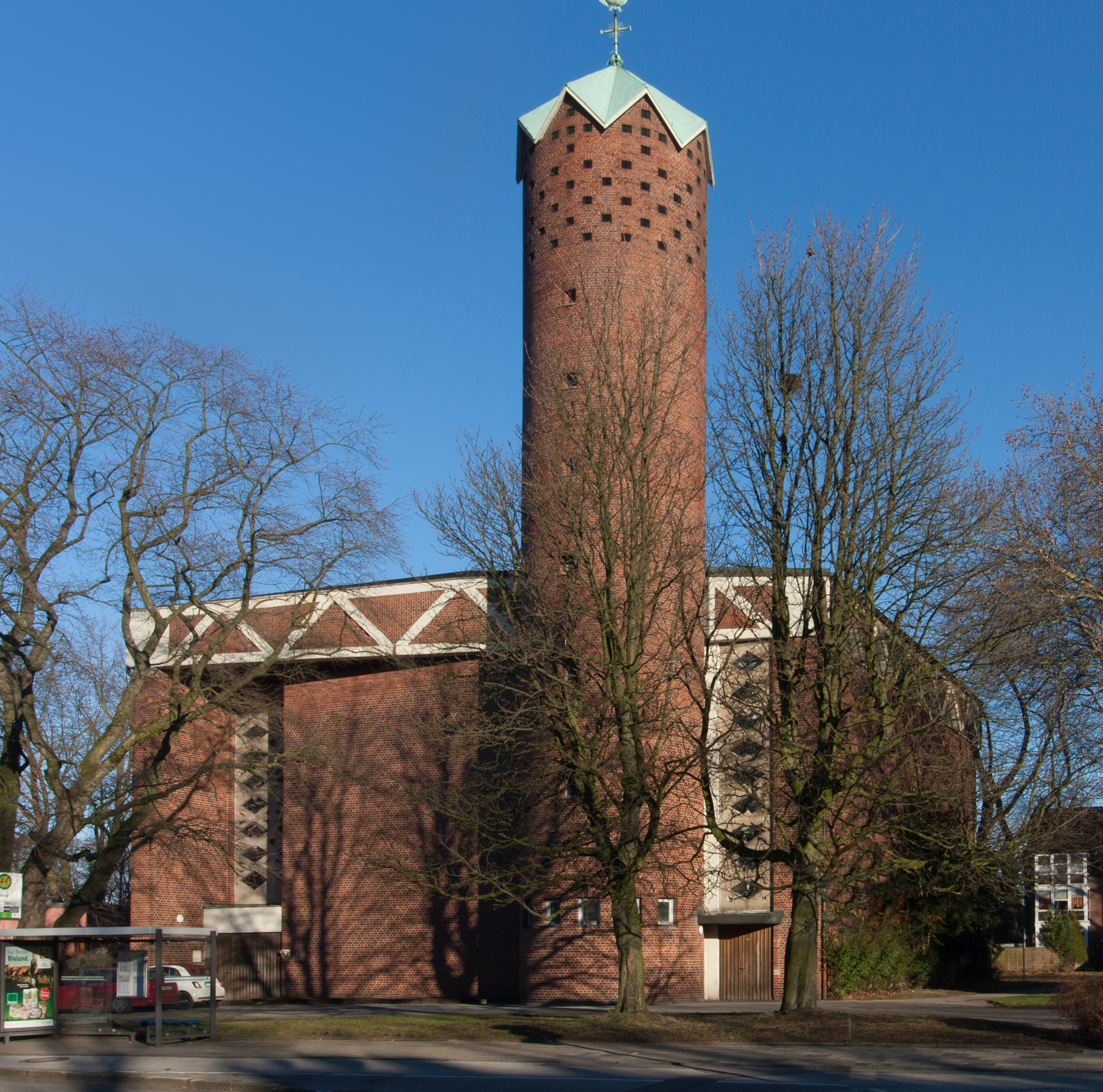 Gelsenkirchen-Hassel, Monument 104, ehem. Kirche St. TheresiaThis is a photograph of an architectural monument., no. 104